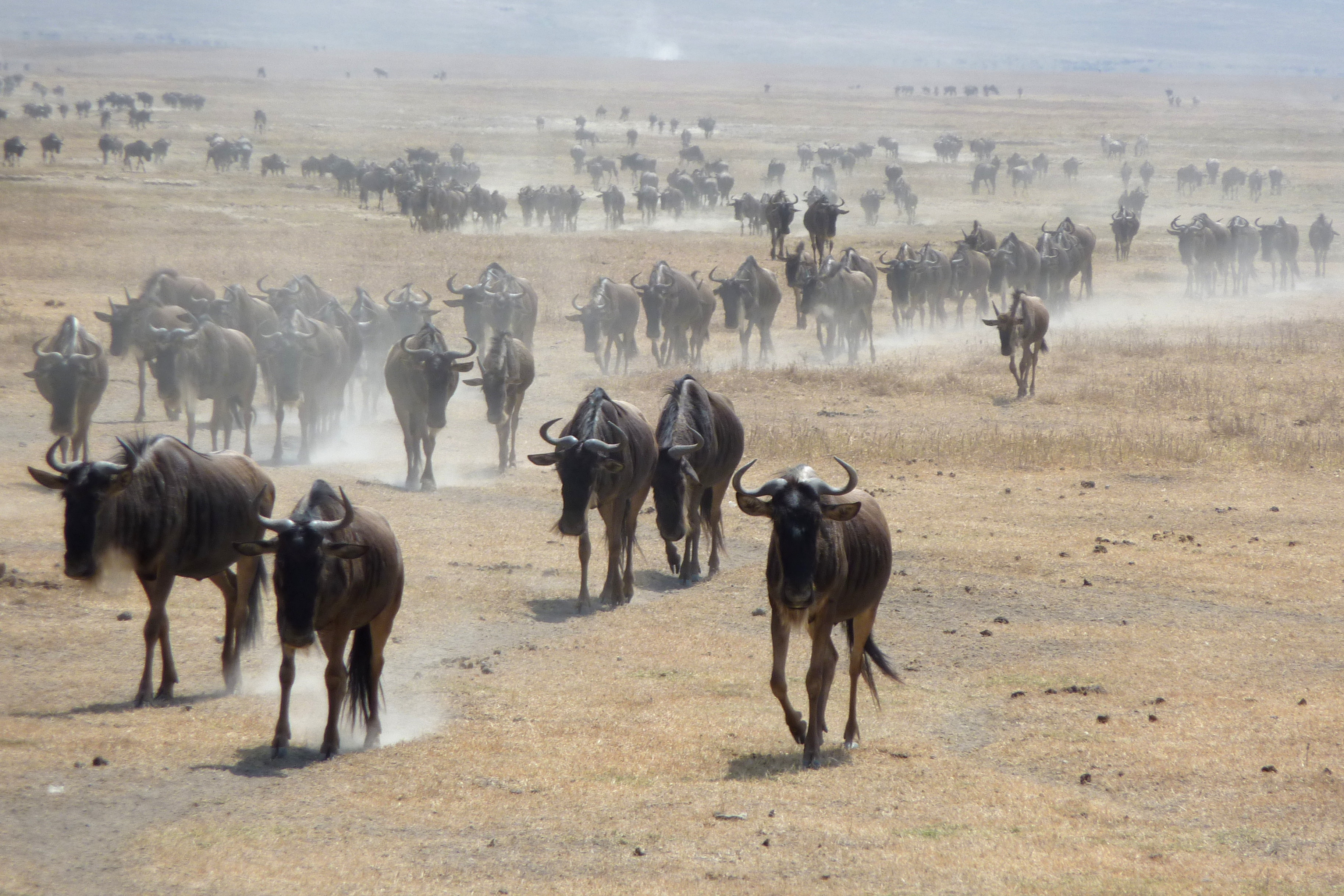 Streifengnus (Connochaetes taurinus) im Ngorongoro-Krater